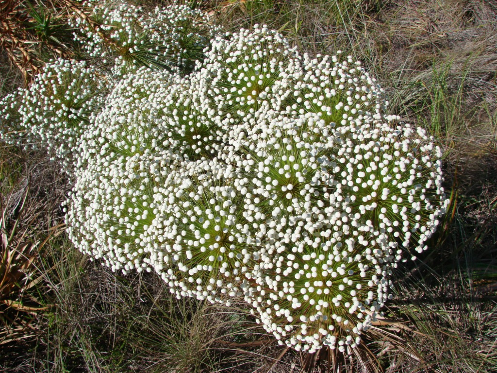 Paepalanthus speciosus - ERIOCAULACEAE - Jardim Bot�nico de Bras�lia - DF - Brasil